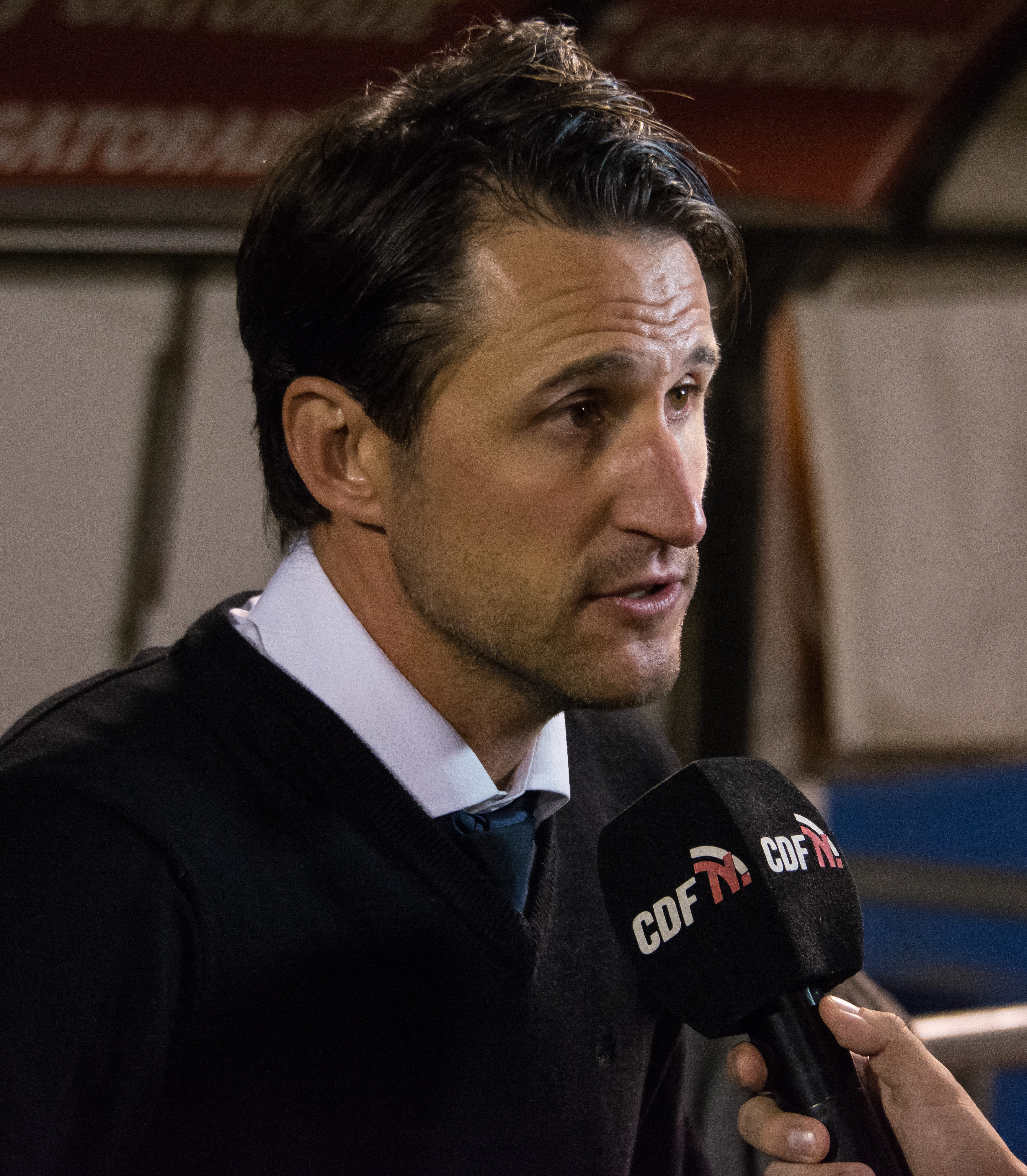 Universidad Católica v Huachipato, Estadio San Carlos de Apoquindo, Las Condes, Santiago, Chile.